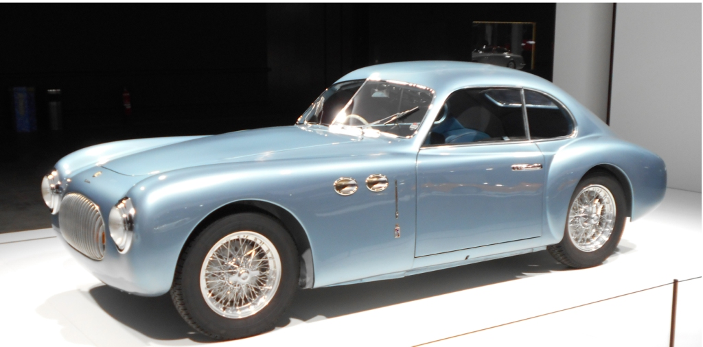 Cisitalia 202 Front